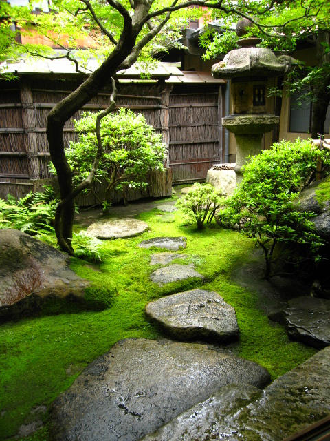 吉田生風庵 庭園